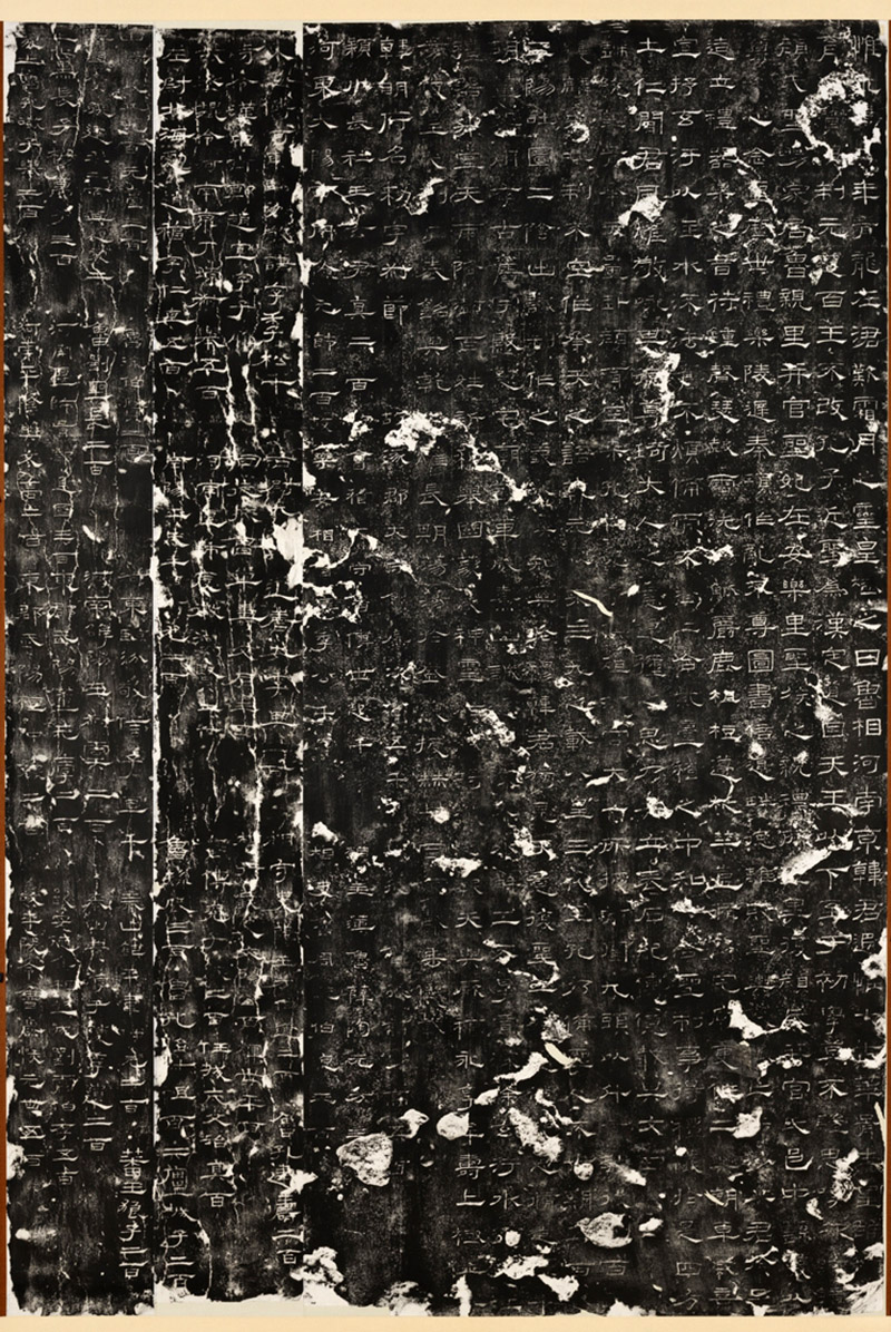 中文（台灣）: 漢禮器碑墨拓本 軸，現收藏於台灣台北市國立故宮博物院